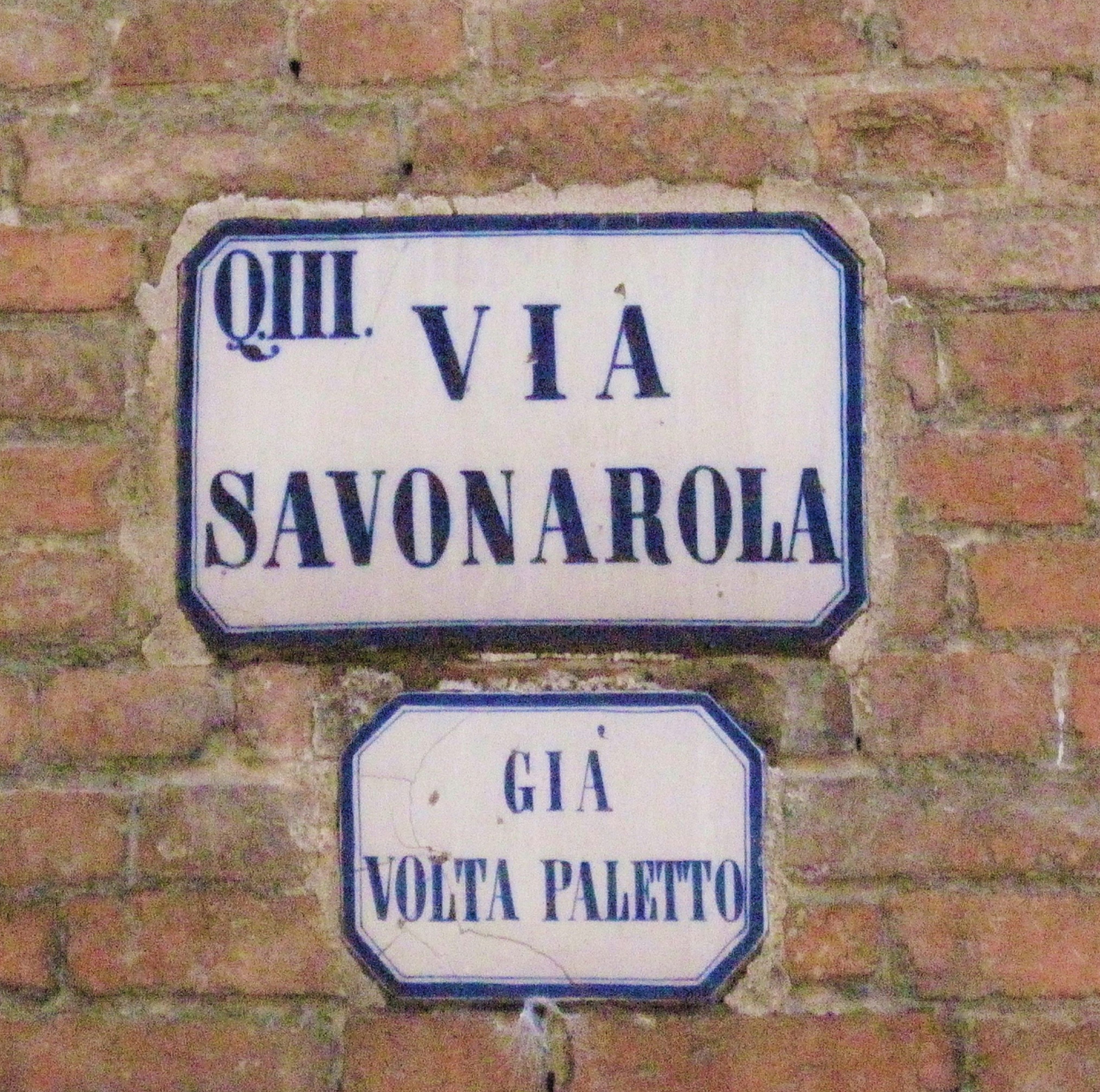 Targa col nome della via recente e targa col nome precedente